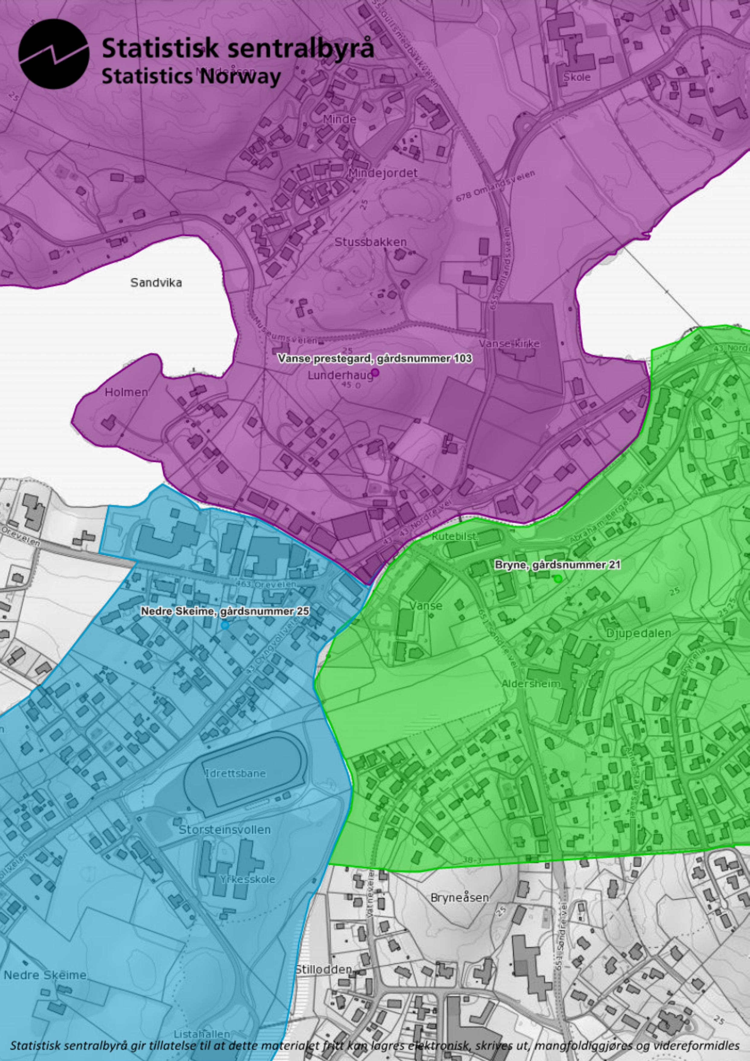 Vanse sentrum hvor matrikkelgårdene Vanse prestegård, Bryne og Nedre Skeime møtes.